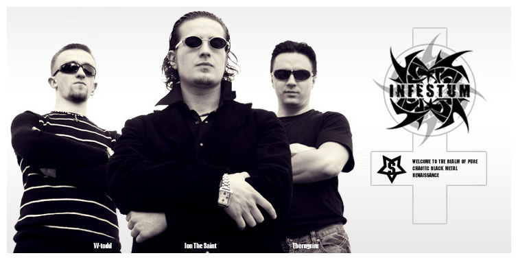 Группа Infestum (2009 г.)